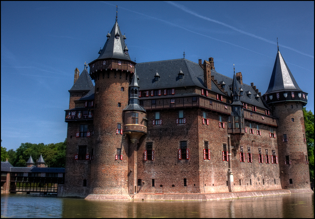 Foto van kasteel de Haar aan het slotgracht.